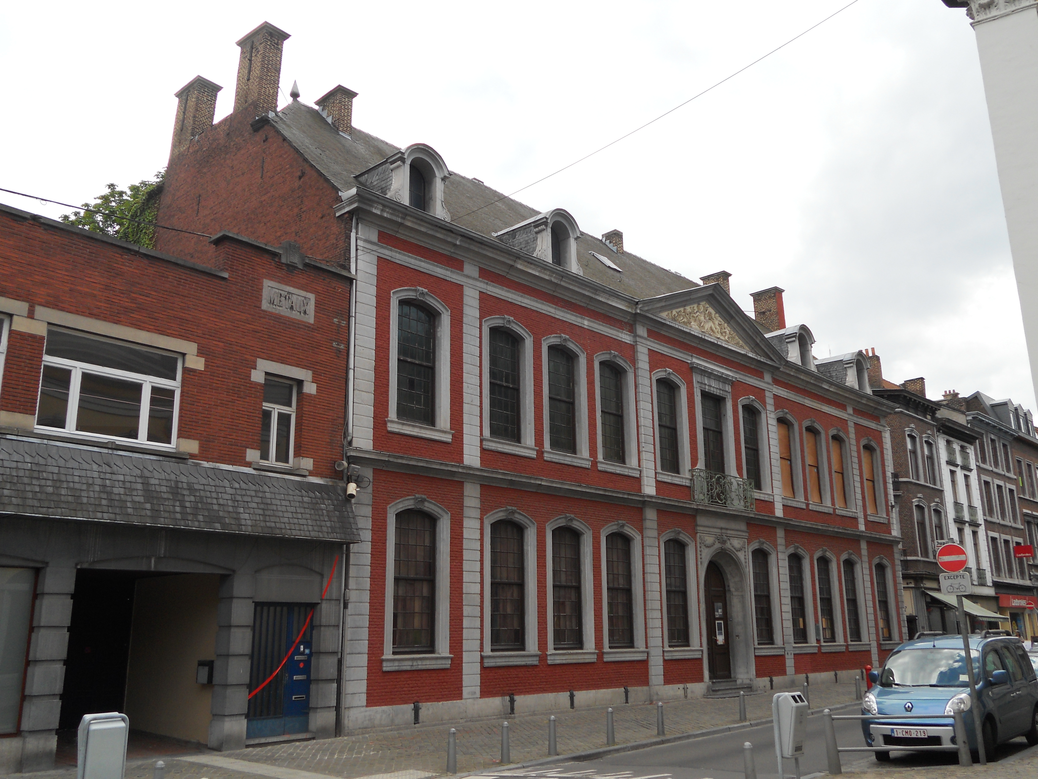 Façade du musée d'Ansembourg construit entre 1738 et 1741 par Michel Willems .